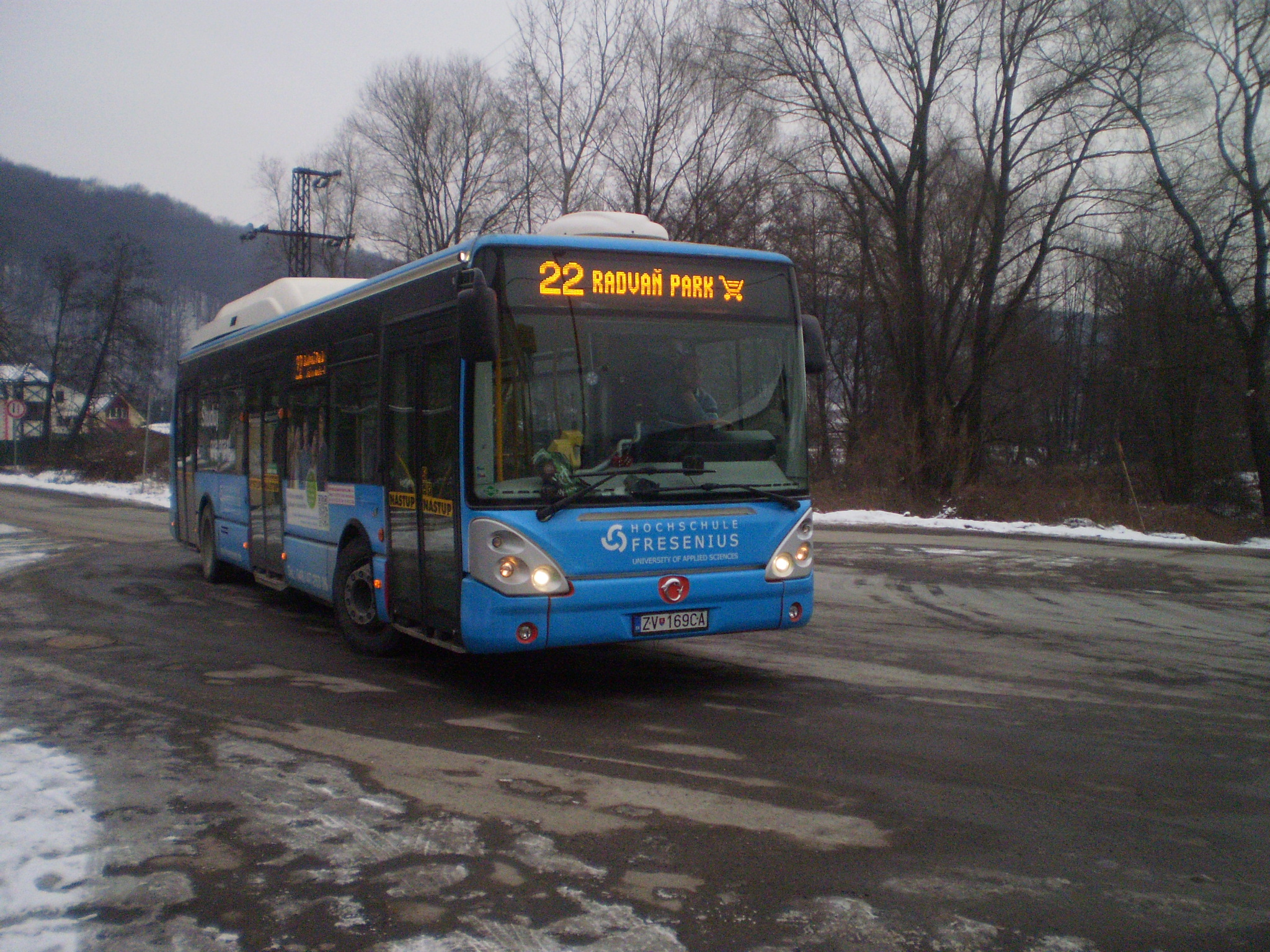 MHD BB